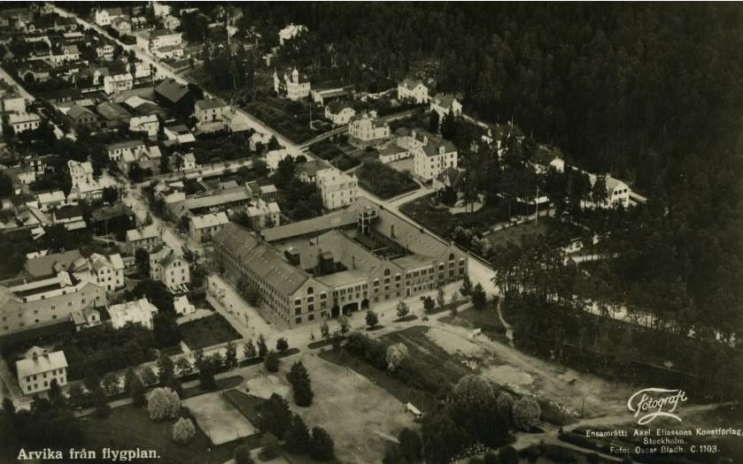 Aerial view over Arvikaverken in Arvika in Sweden